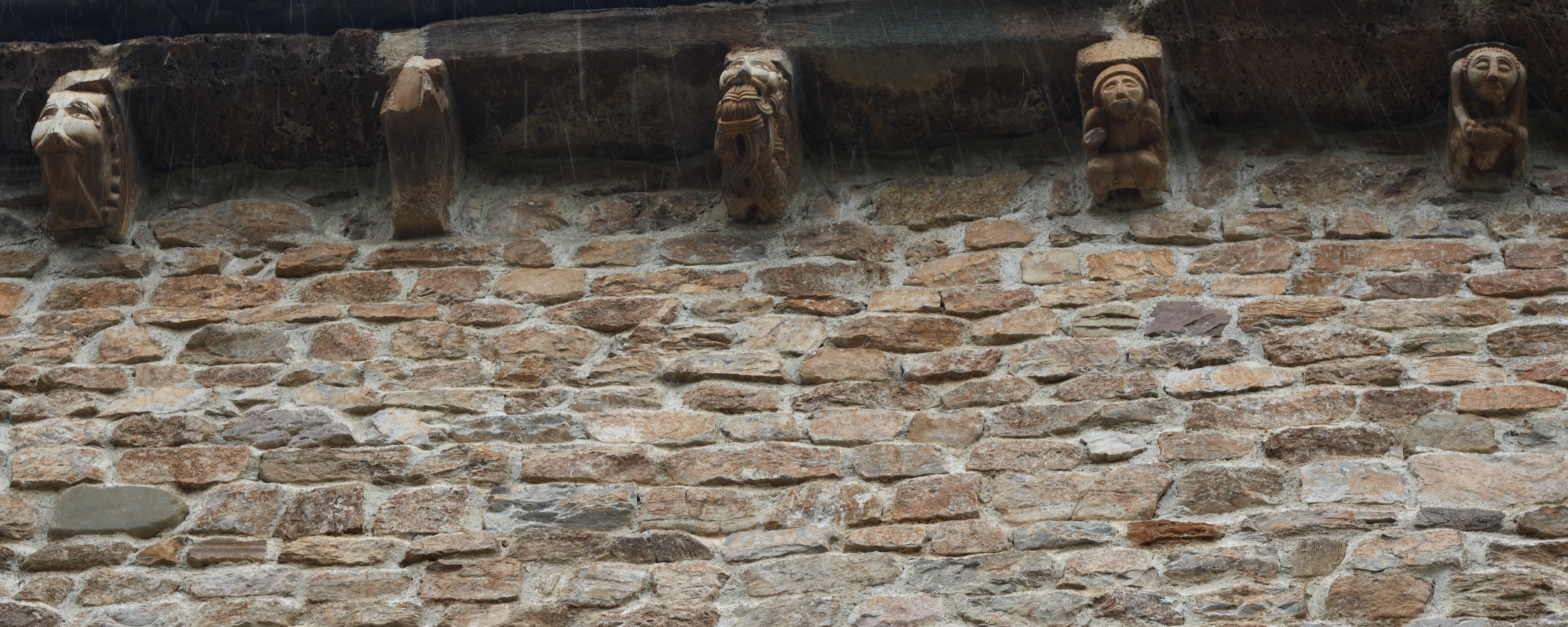 Katholische Kirche San Esteban in Corullón, einer Gemeinde in der spanischen Provinz León (Kastilien und León), Kragsteine unter dem Dachansatz